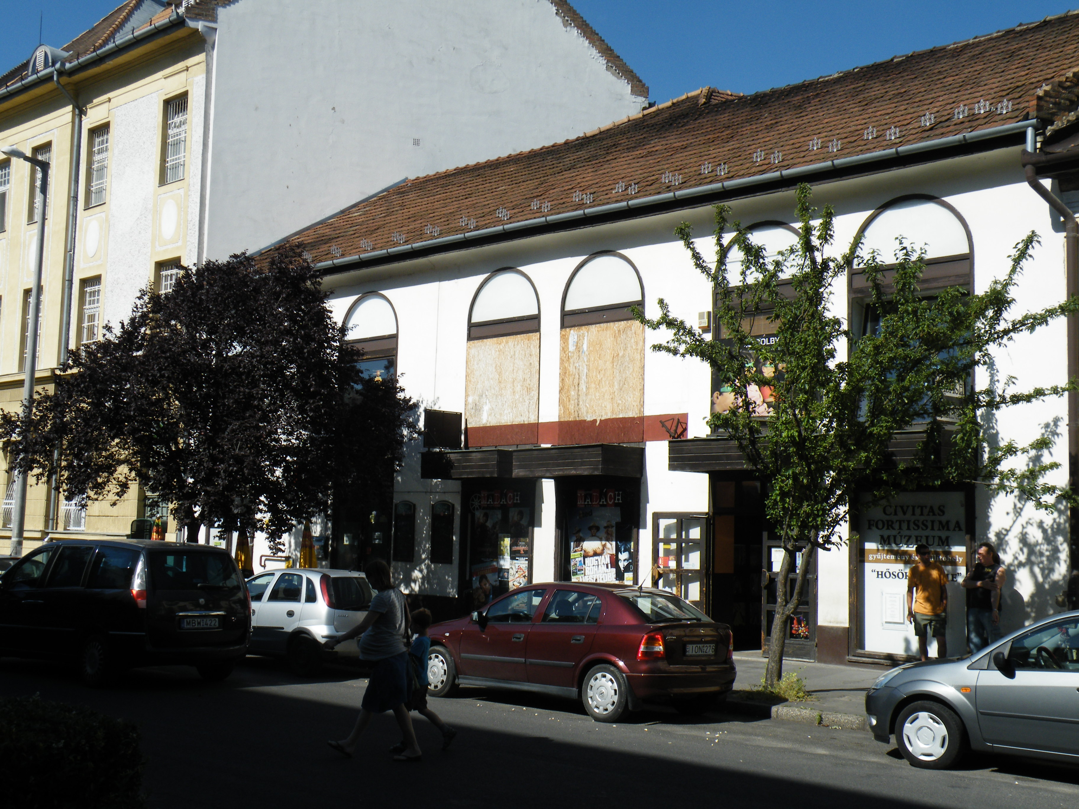 A Madách Filmszínház Bajcsy-Zsilinszky úti épülete